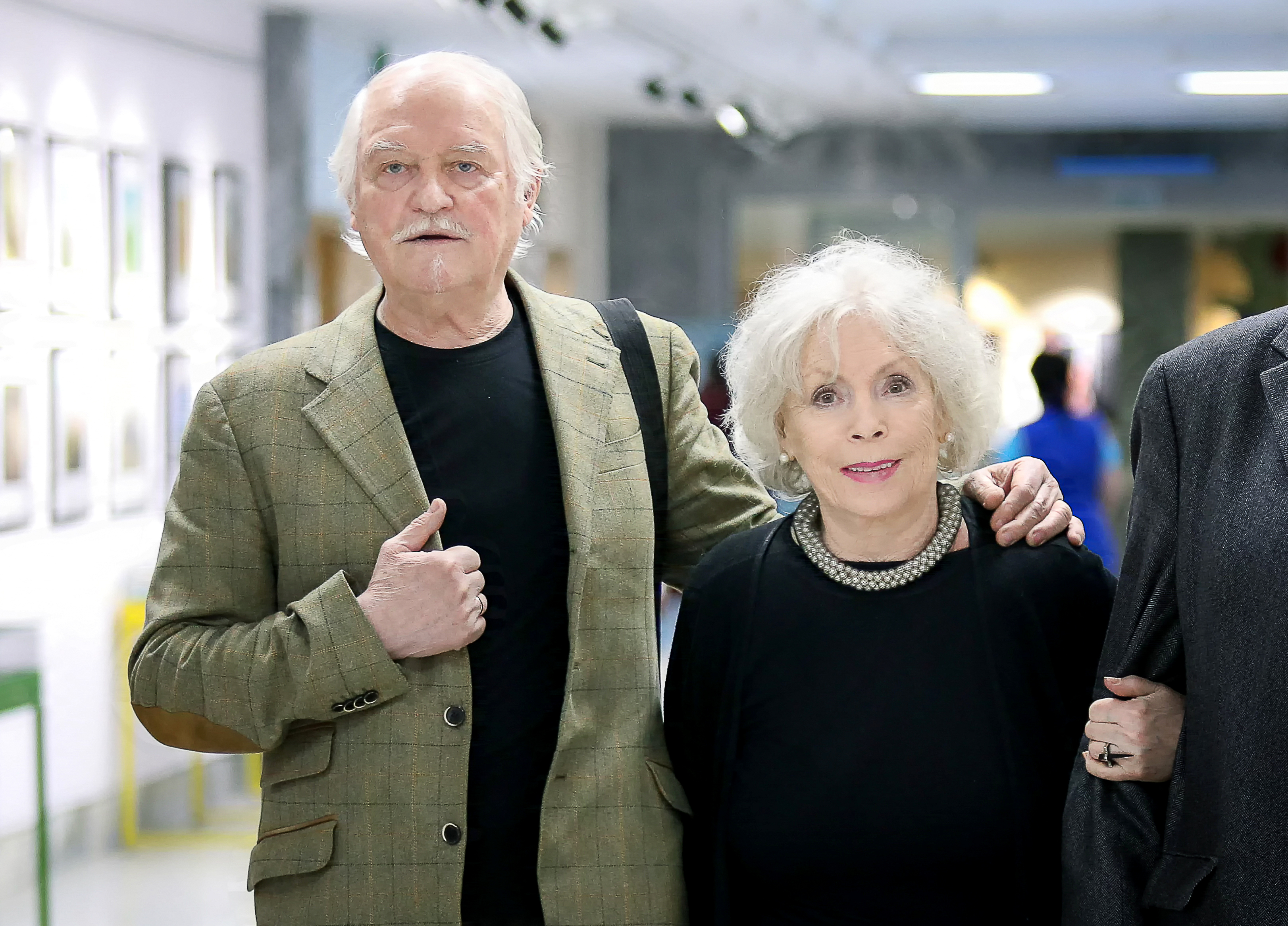 Алла Будницкая (актриса) с мужем Александром Орловым (актёр, кинорежиссёр) в Российской государственной детской библиотеке. Открытие выставки Народного художника РФ Сергея Алимова.